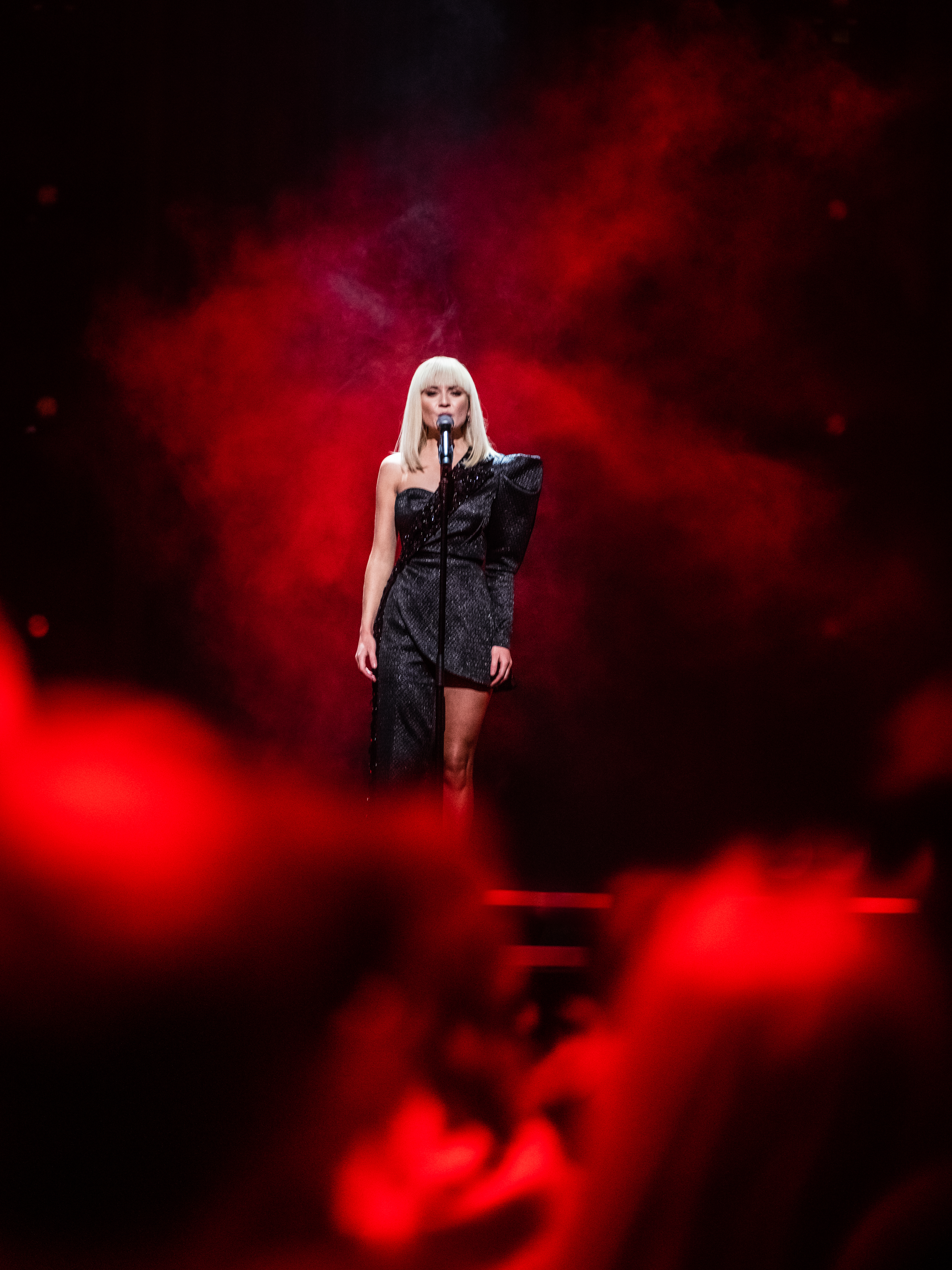 Anna Bergendahl framför sitt bidrag "Kingdom Come" i finalen i Melodifestivalen 2020, stående på scen framför rödfärgad rök